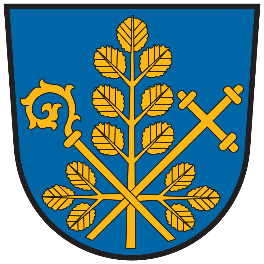 Wappen von Glödnitz